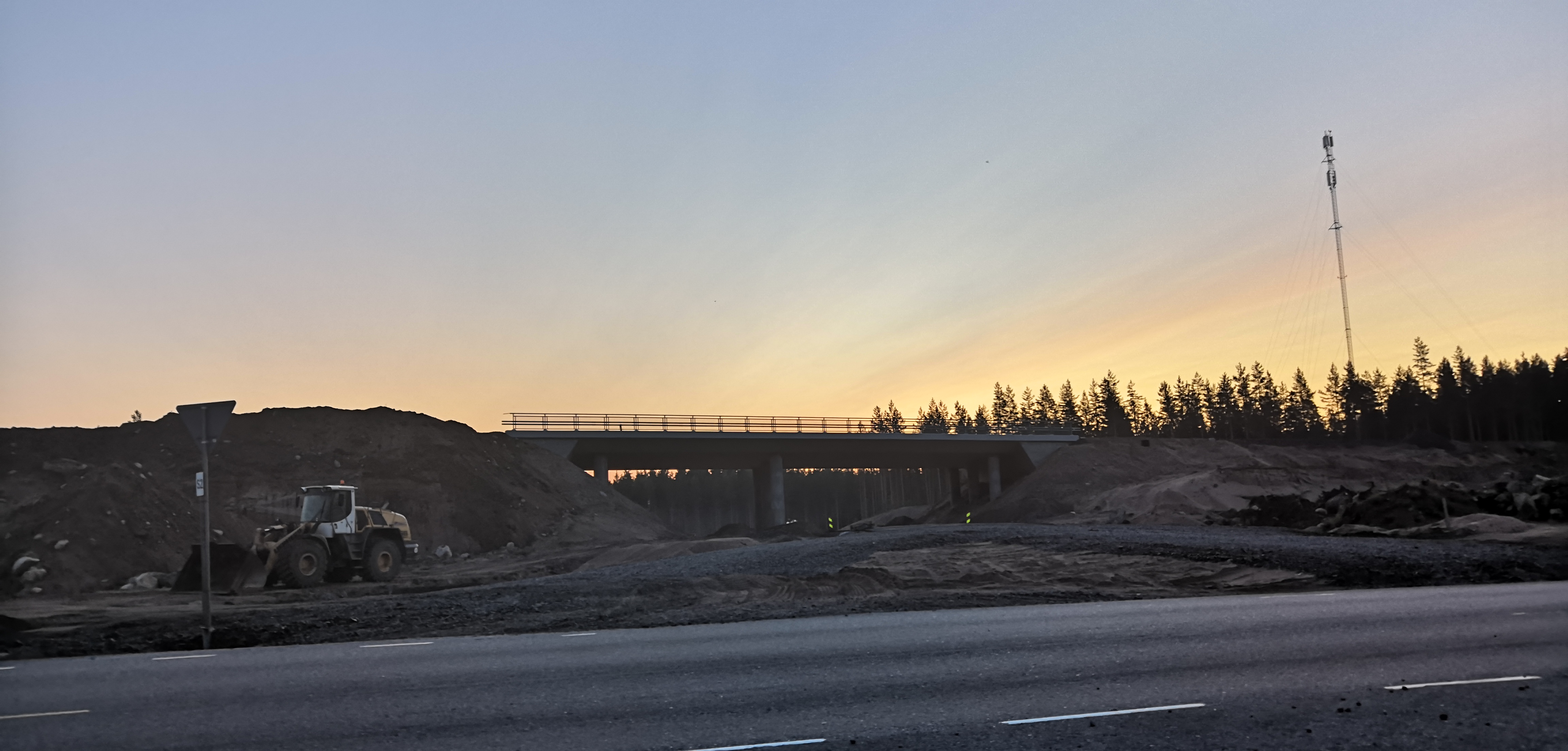 Valtatie 12 Tillolan liittymän rakennustyömaa heinäkuussa 2019